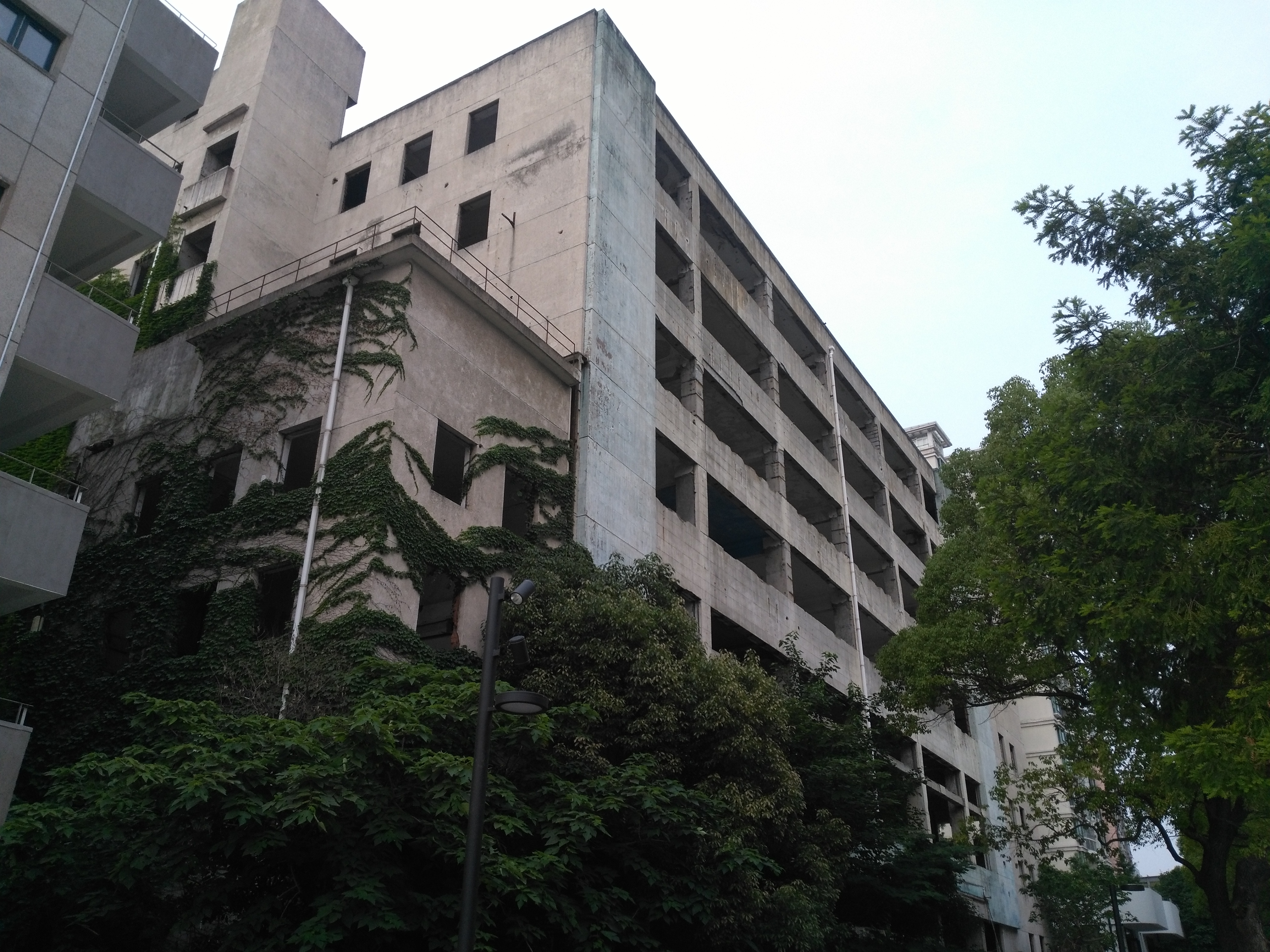 上生新所园区随拍